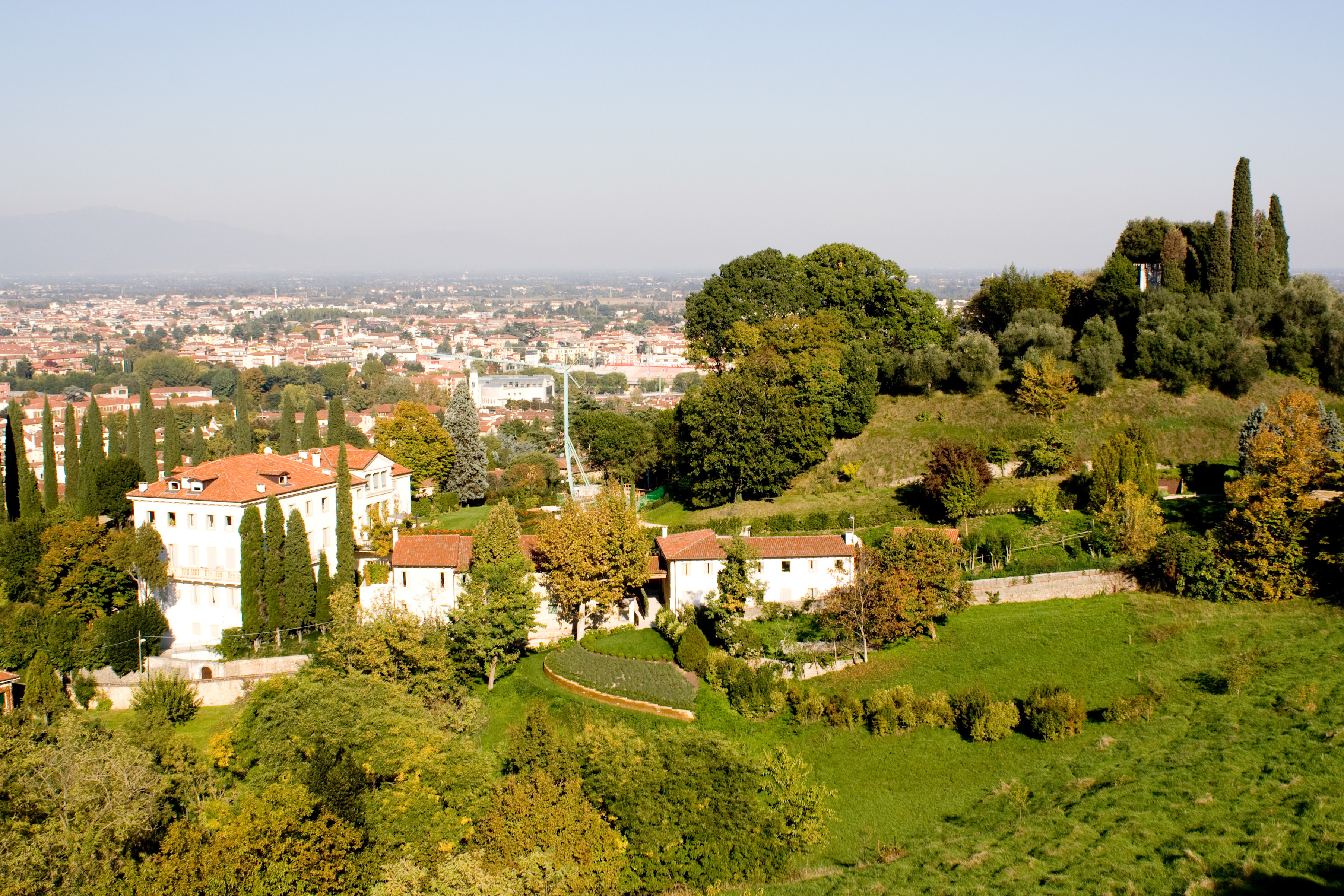 Vicenza - Monte Berico - Panorama della città